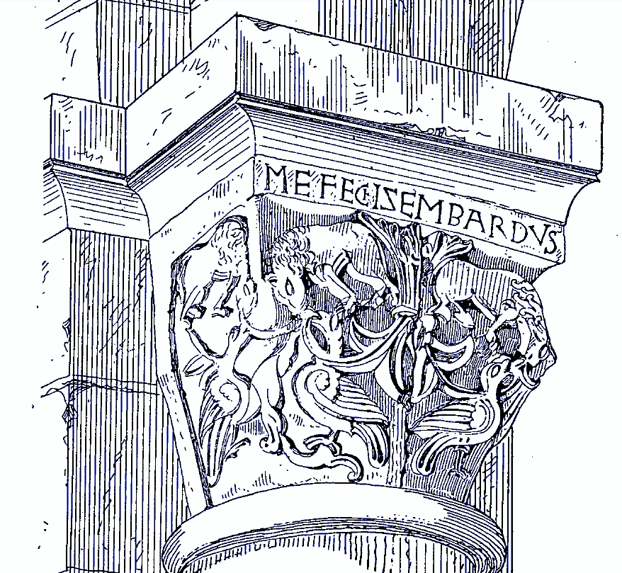 Abbaye de Bernay, sculpture d'Isembart (image du domaine public modifiée, Congrès archéologique de Caen en 1909)